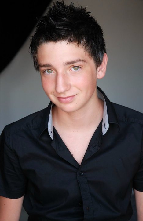 LORENZO FEDERICI